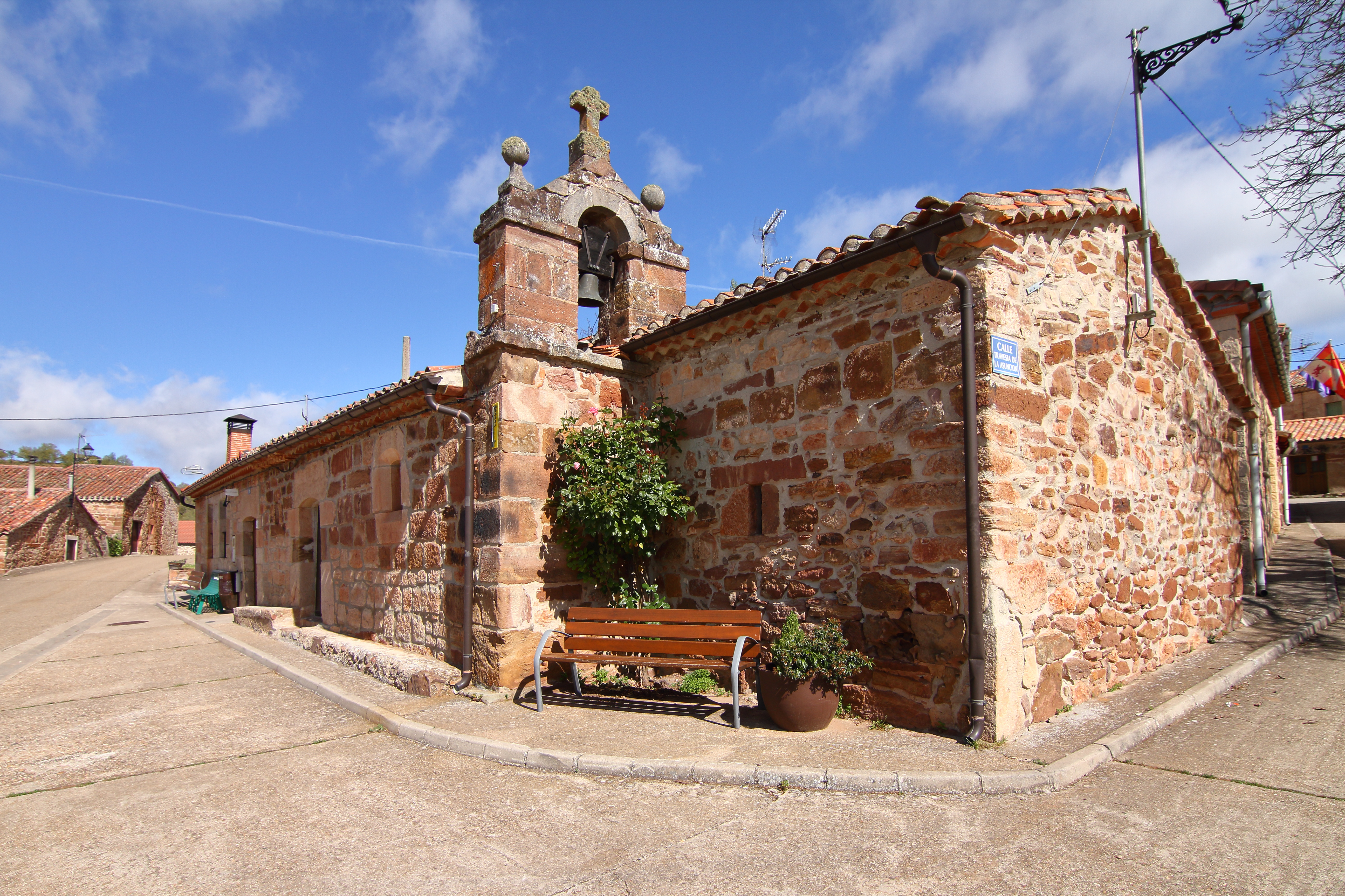 Villoruebo, Ermita misa Villoruebo